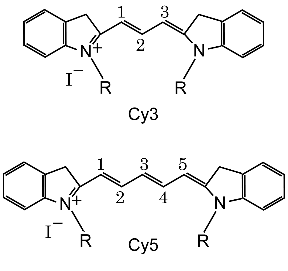 Cy3&Cy5_dyes